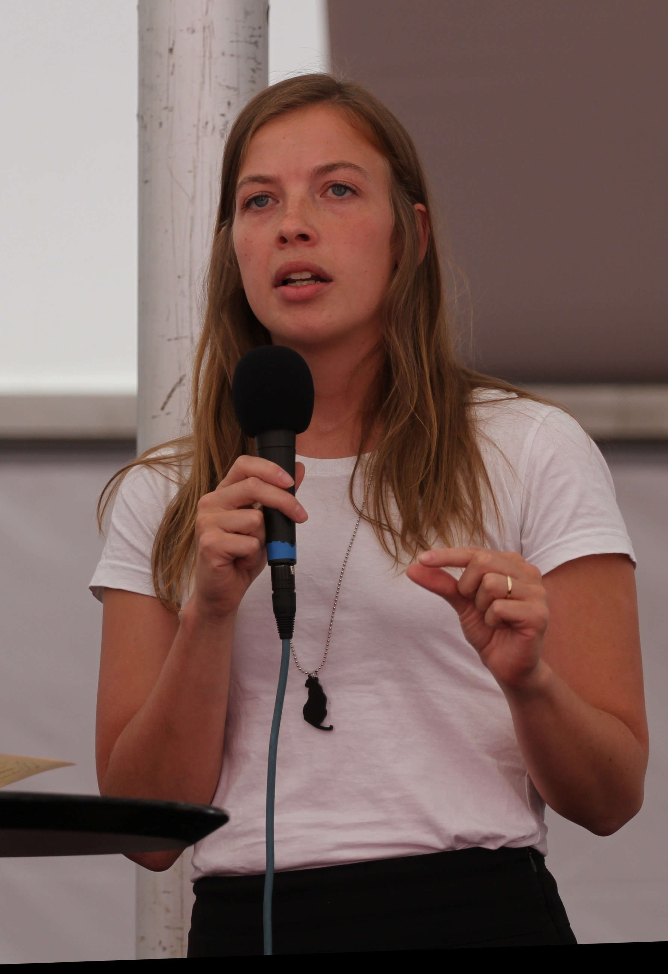 Vasemmistonnuorten puheenjohtaja Li Andersson puhumassa Suomi Areena -tapahtumassa Porissa 2014.